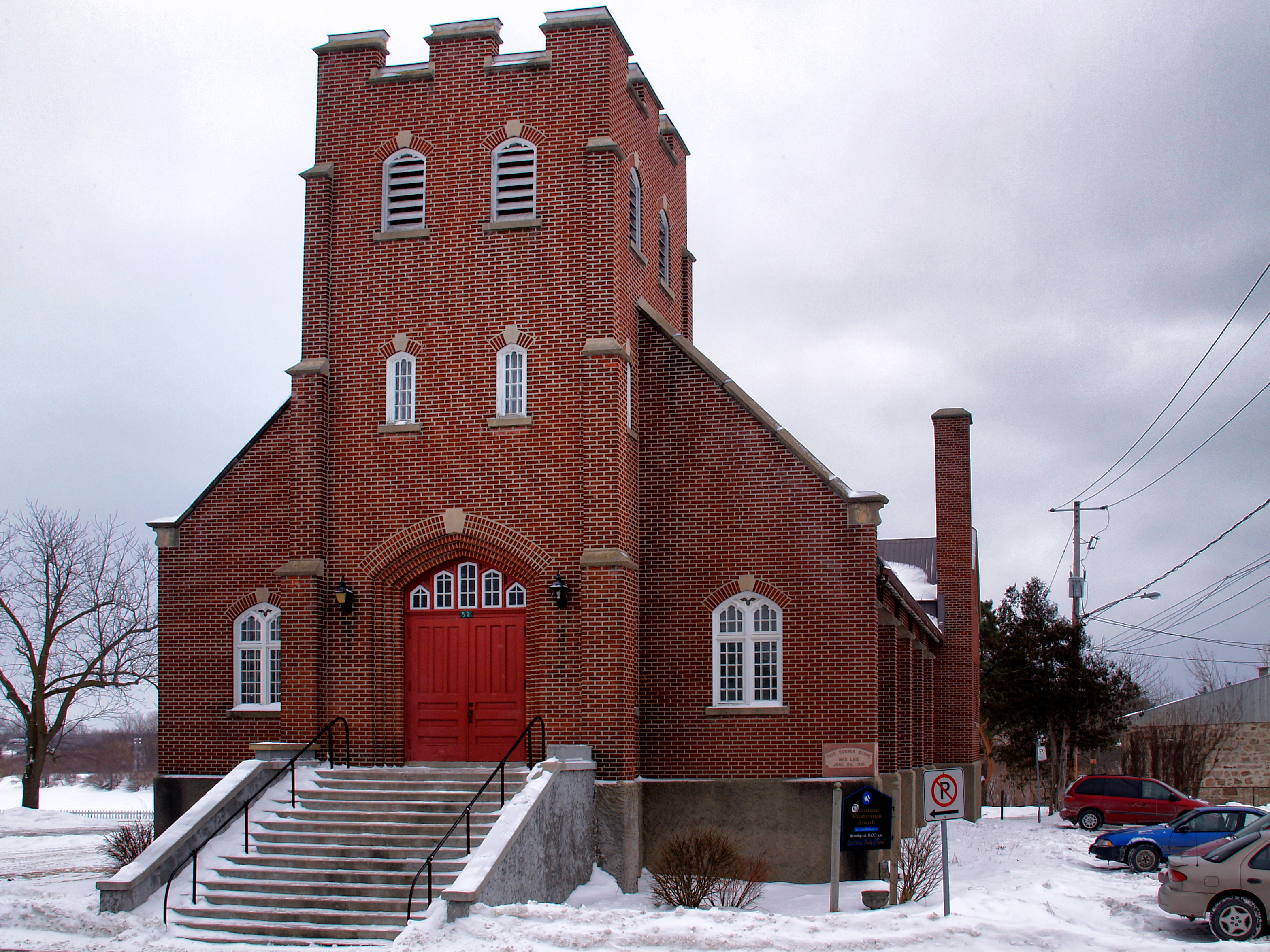 Ormstown, Montérégie (Québec) - L'église presbytérienne